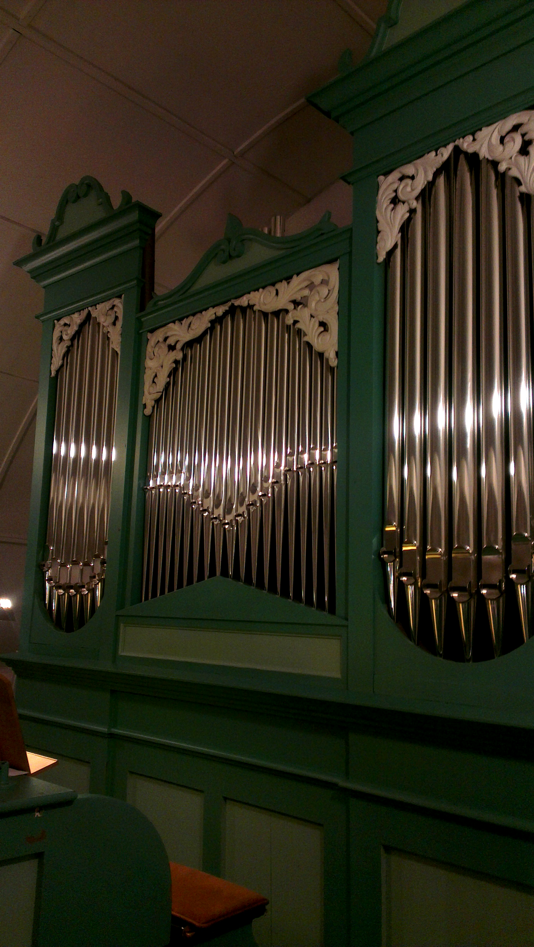 Voigt-Orgel mit neuem Prospekt Dezember 2013